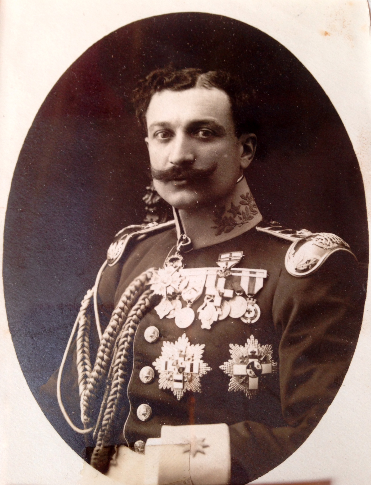 Zaragoza